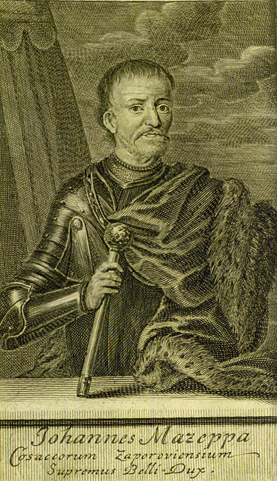 Портрет-гравюра гетмана Войска Запорожского Ивана Мазепы, опубликованная в немецком издании в 1704 году. Описание (на латыни): «Johannes Mazeppa, Cosaccorum Zaporoviensium Supremus Belli-Dux.»